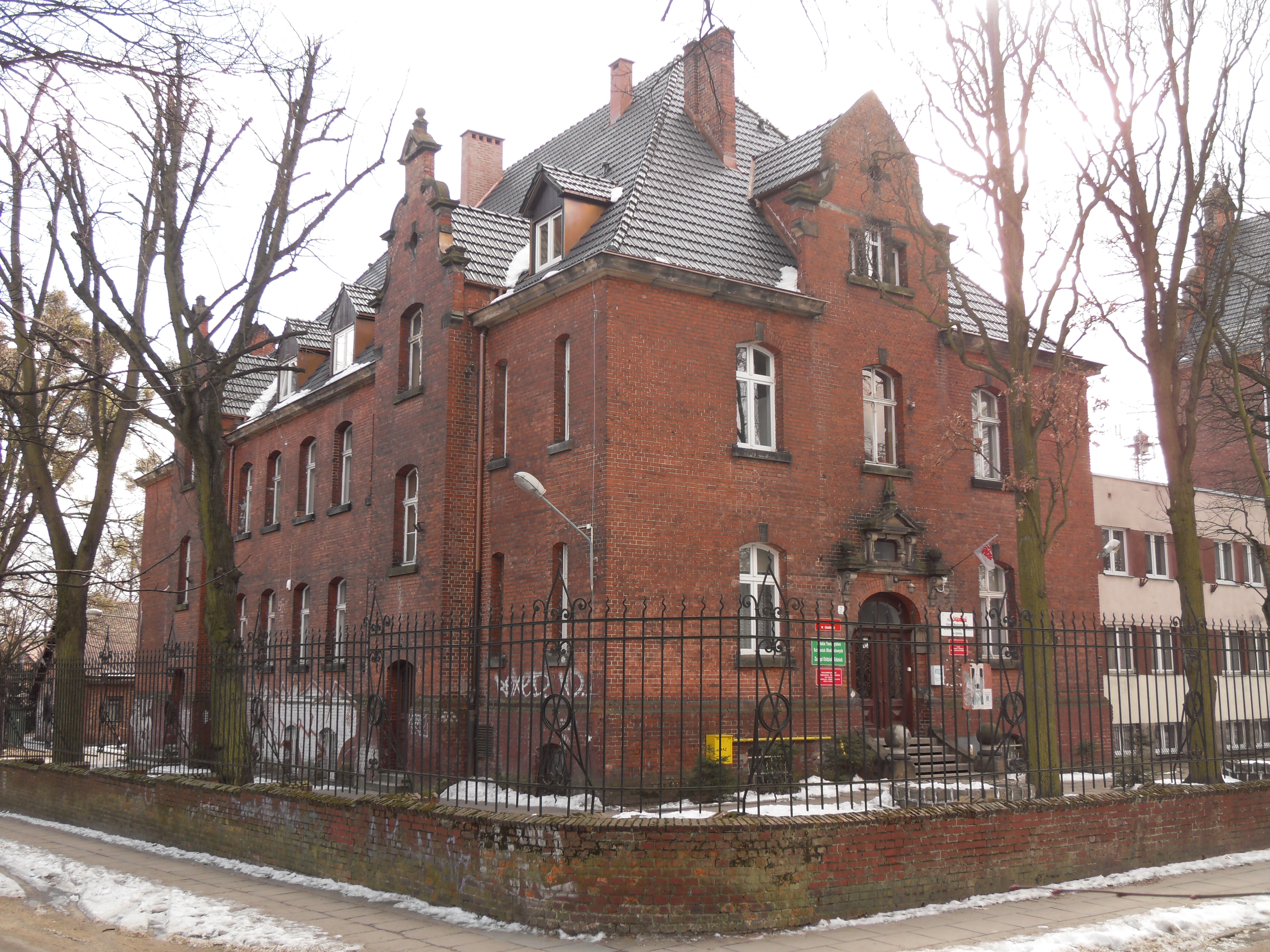 Gdańsk Wrzeszcz, szkoła Conradinum - zabytkowy internat.